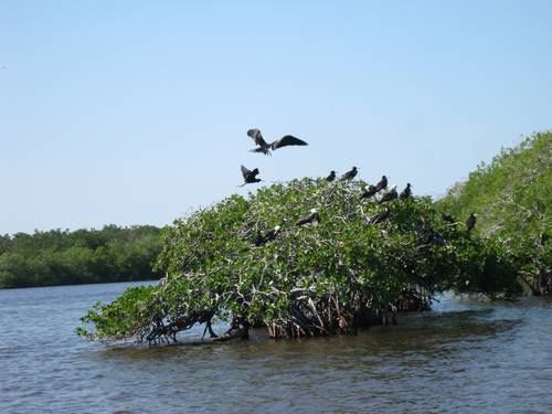 laguna